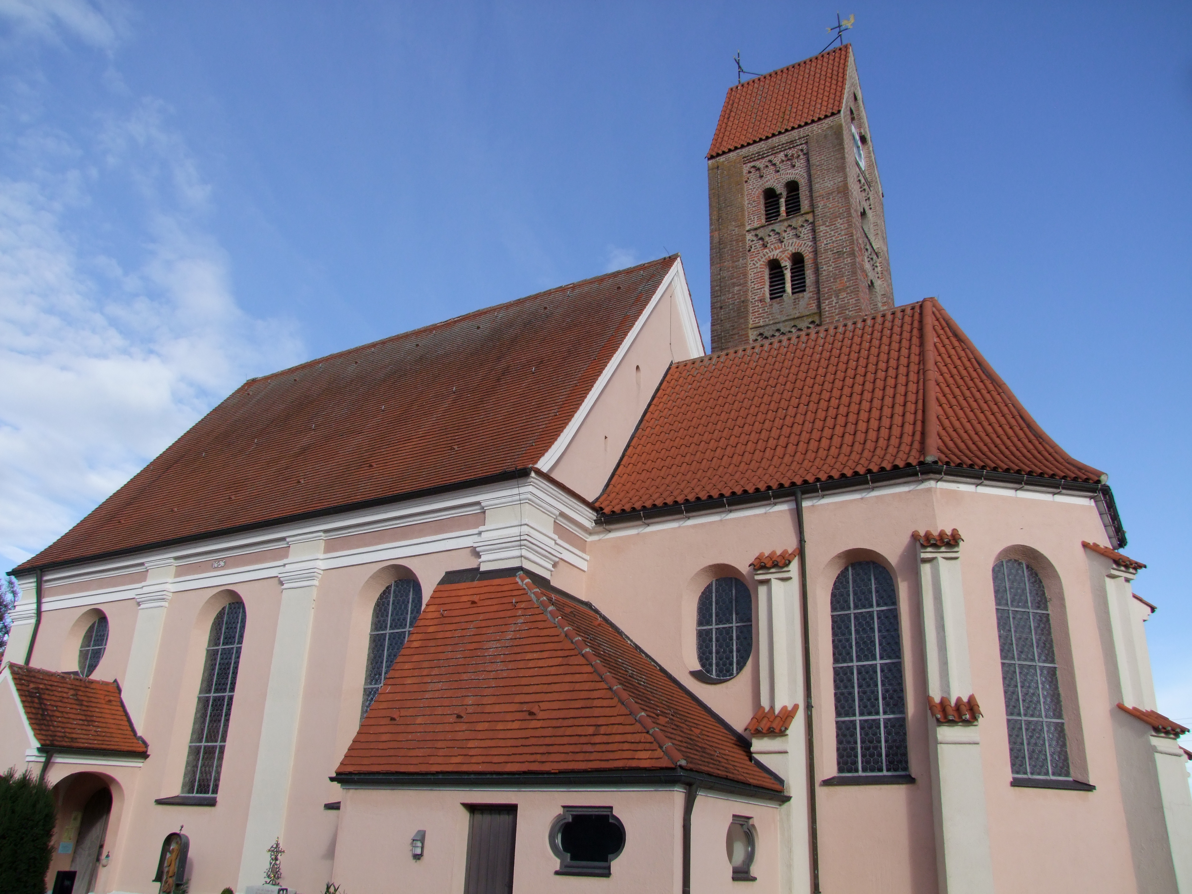 St. Vitus im oberschwäbischen Weicht bei Jengen in Bayerisch/Schwaben